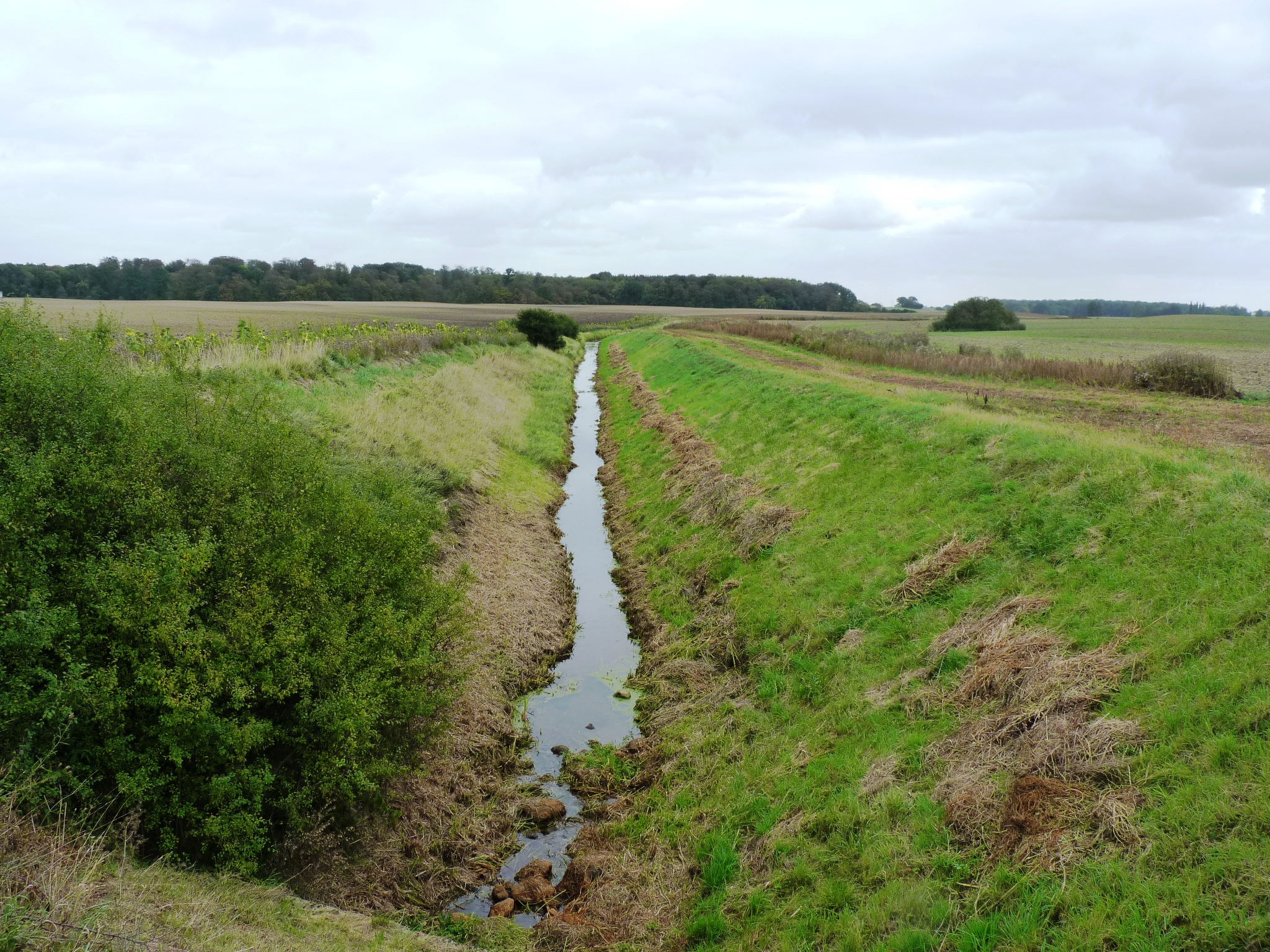 Zare in Richtung Zülow-Ausbau